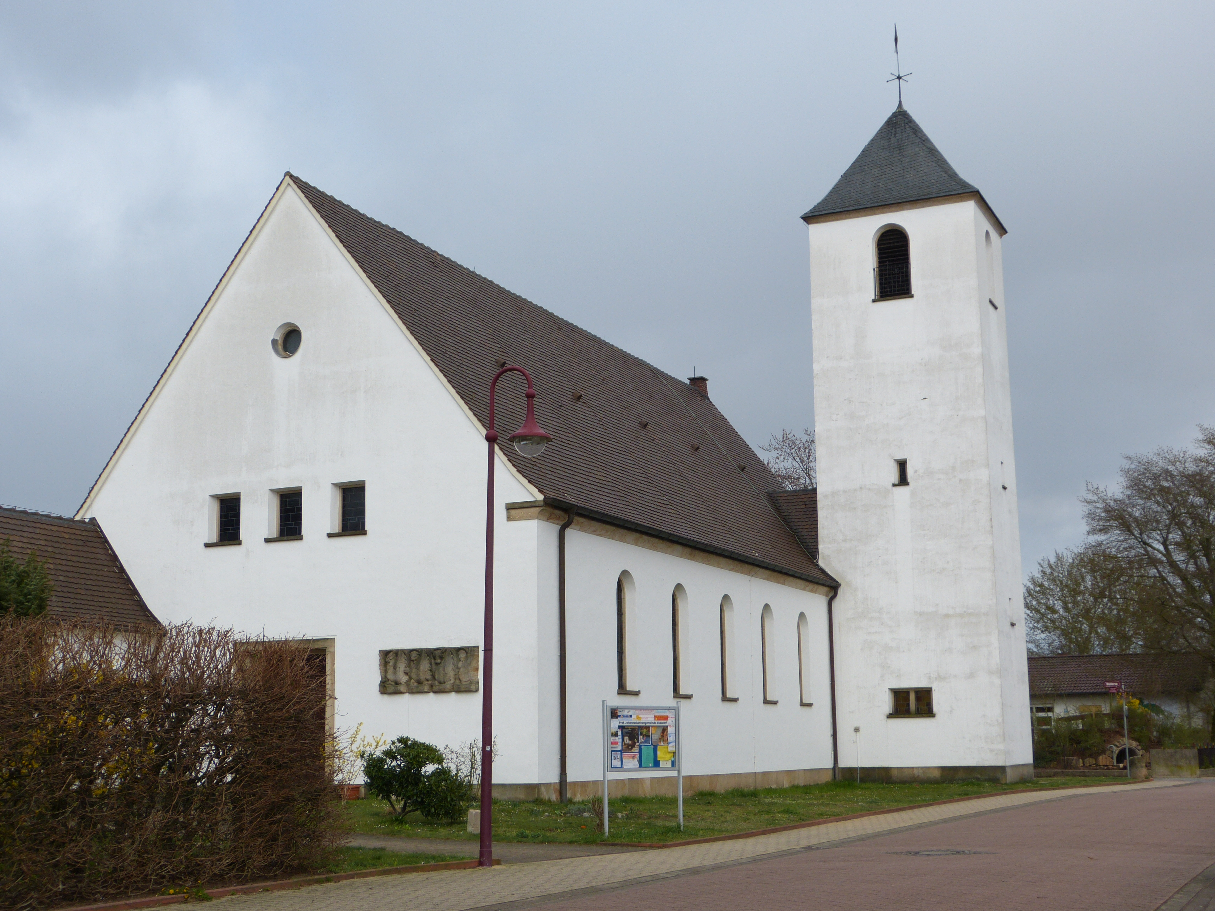 Maxdorf Johanneskirche